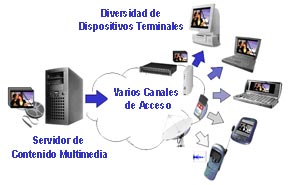 Panorama actual Esquema gráfico sobre la cadena de comunicación en un sistema UMA.